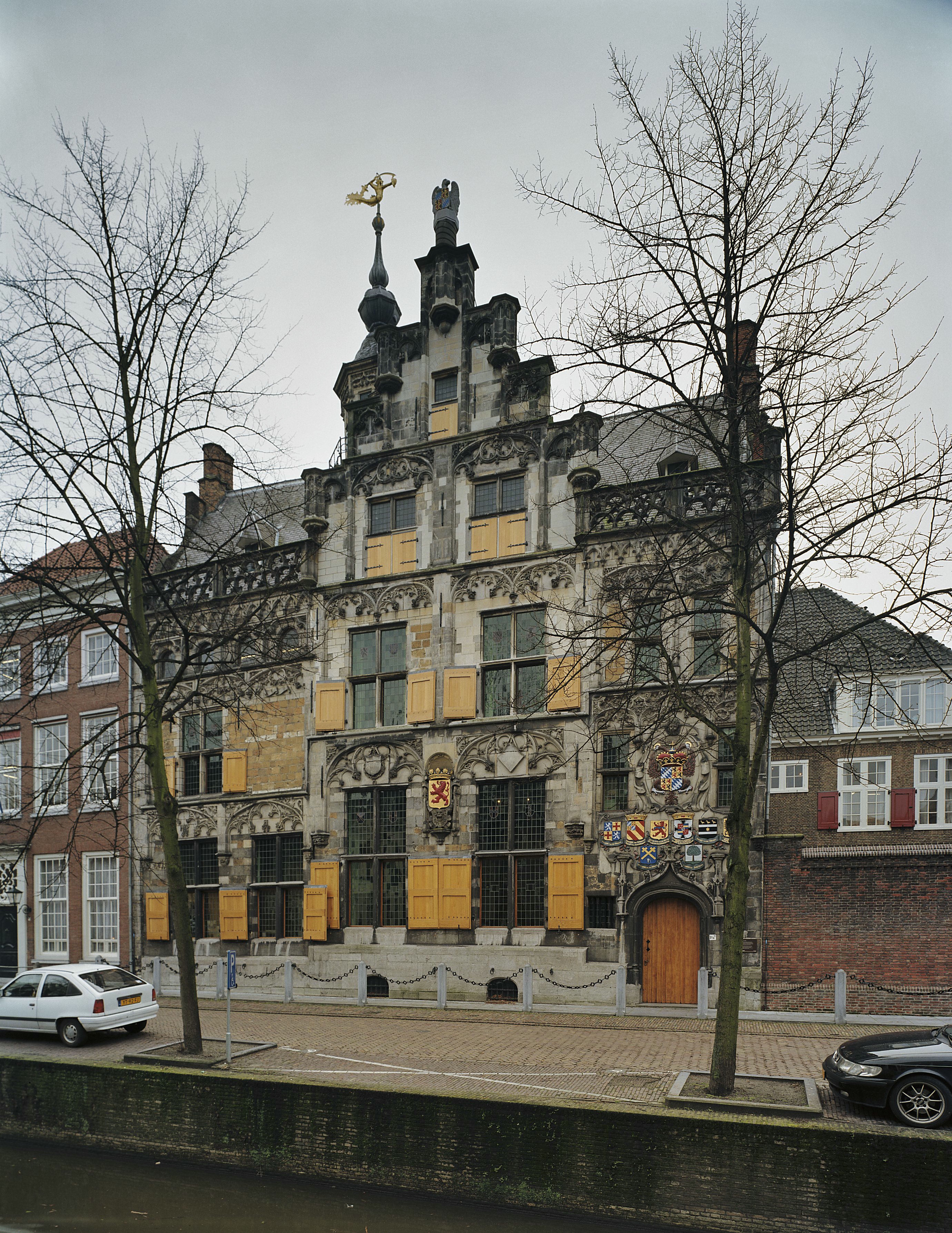 Gemeenlandshuis van Delfland: Voorgevel uitgevoerd met balustrade en de trapgevel met pinakels (opmerking: Gefotografeerd voor Monumenten In Nederland Zuid-Holland)